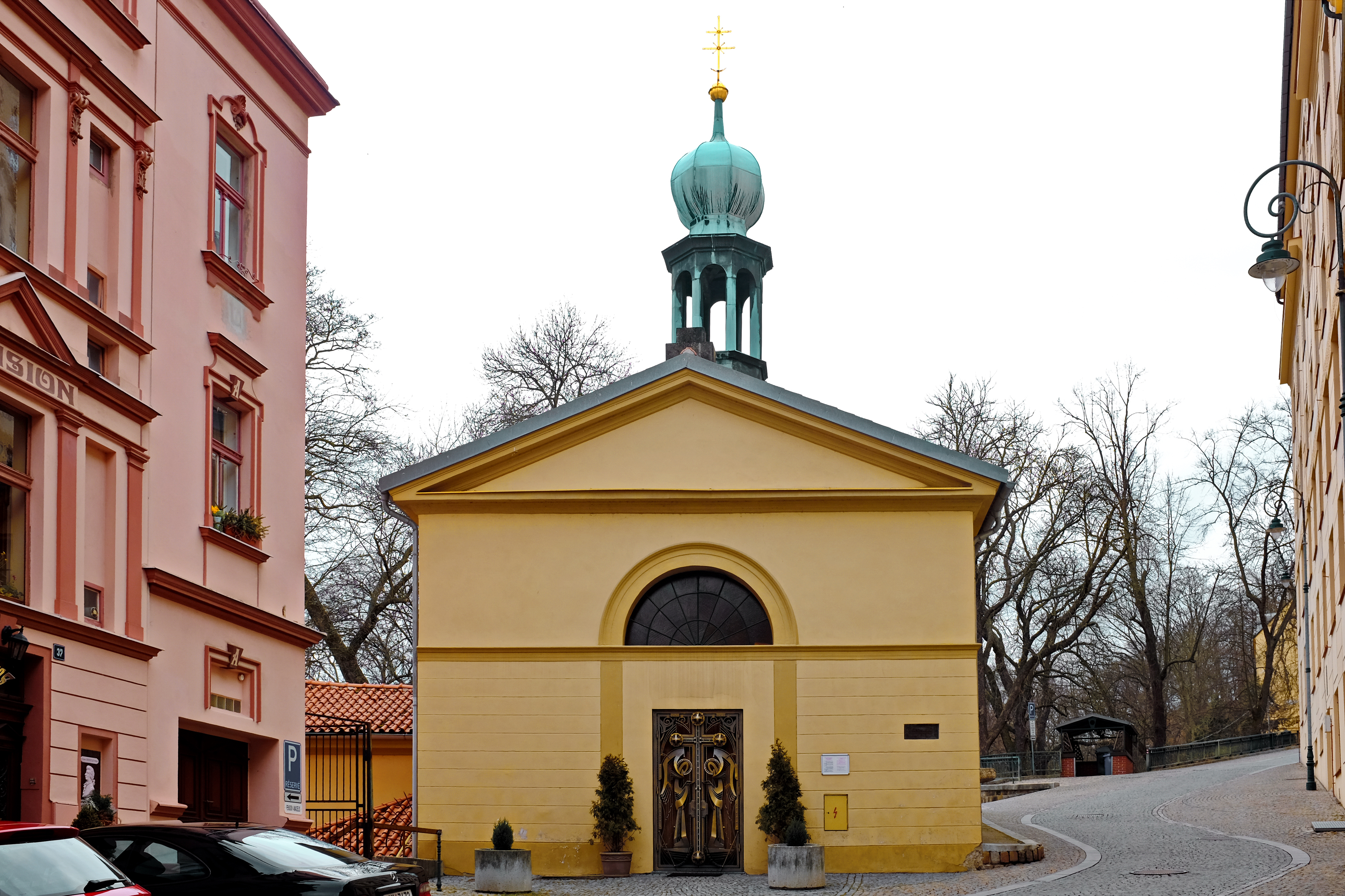 Kostel svatého Ondřeje s Mozartovými sady, Ondřejská 2/39, Karlovy Vary.